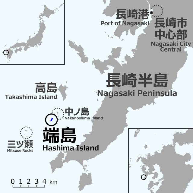 端島（軍艦島)の位置